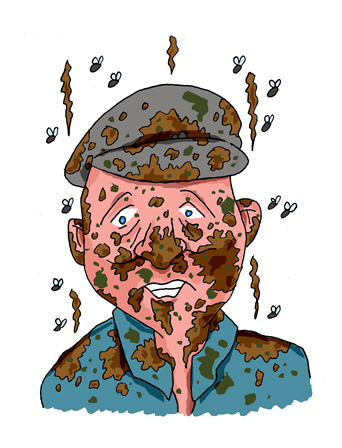 Bartje Poep als prent (ill. Jos Koman)